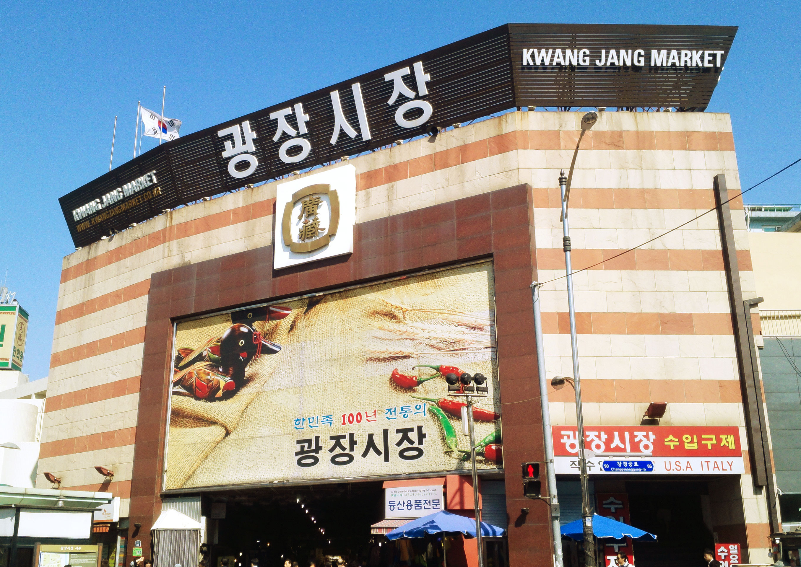 The Main Entrance of Gwangjang Market